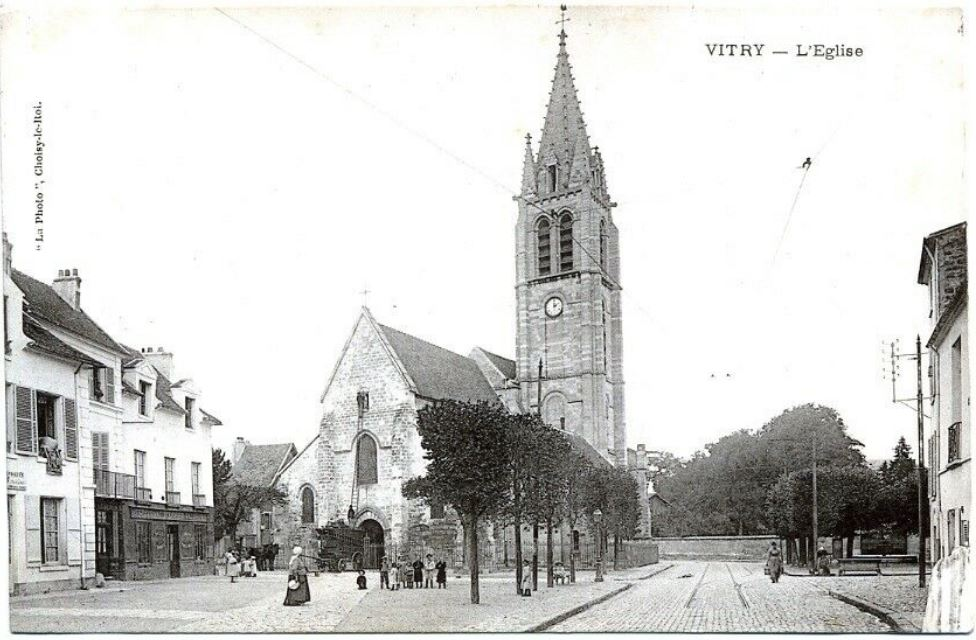 Église Saint-Germain de Vitry-sur-Seine